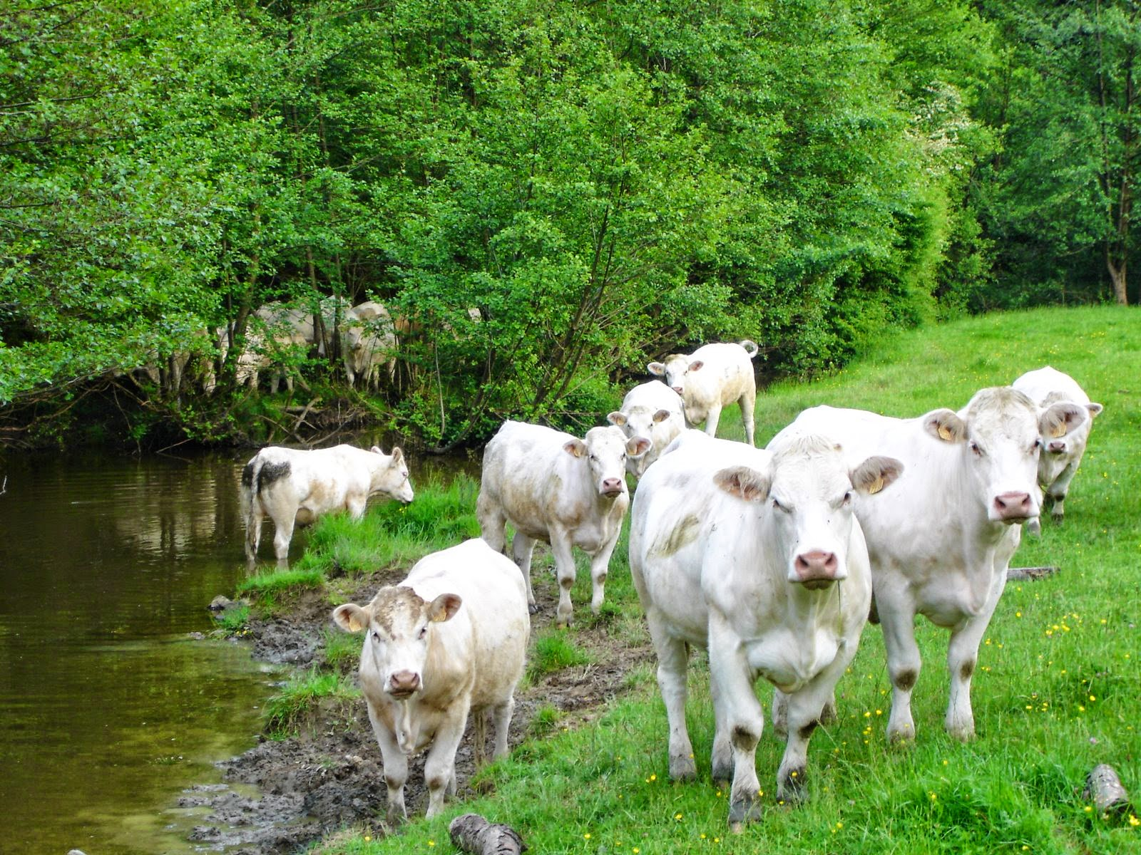 Limousin Frankrijk